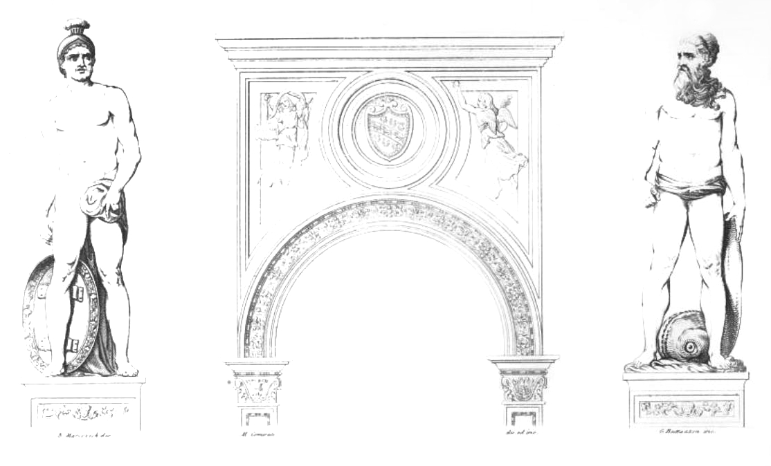 Incisione tratta da: "Il Palazzo Ducale di Venezia illustrato da Francesco Zanotto, con incisioni, Venezia 1841"